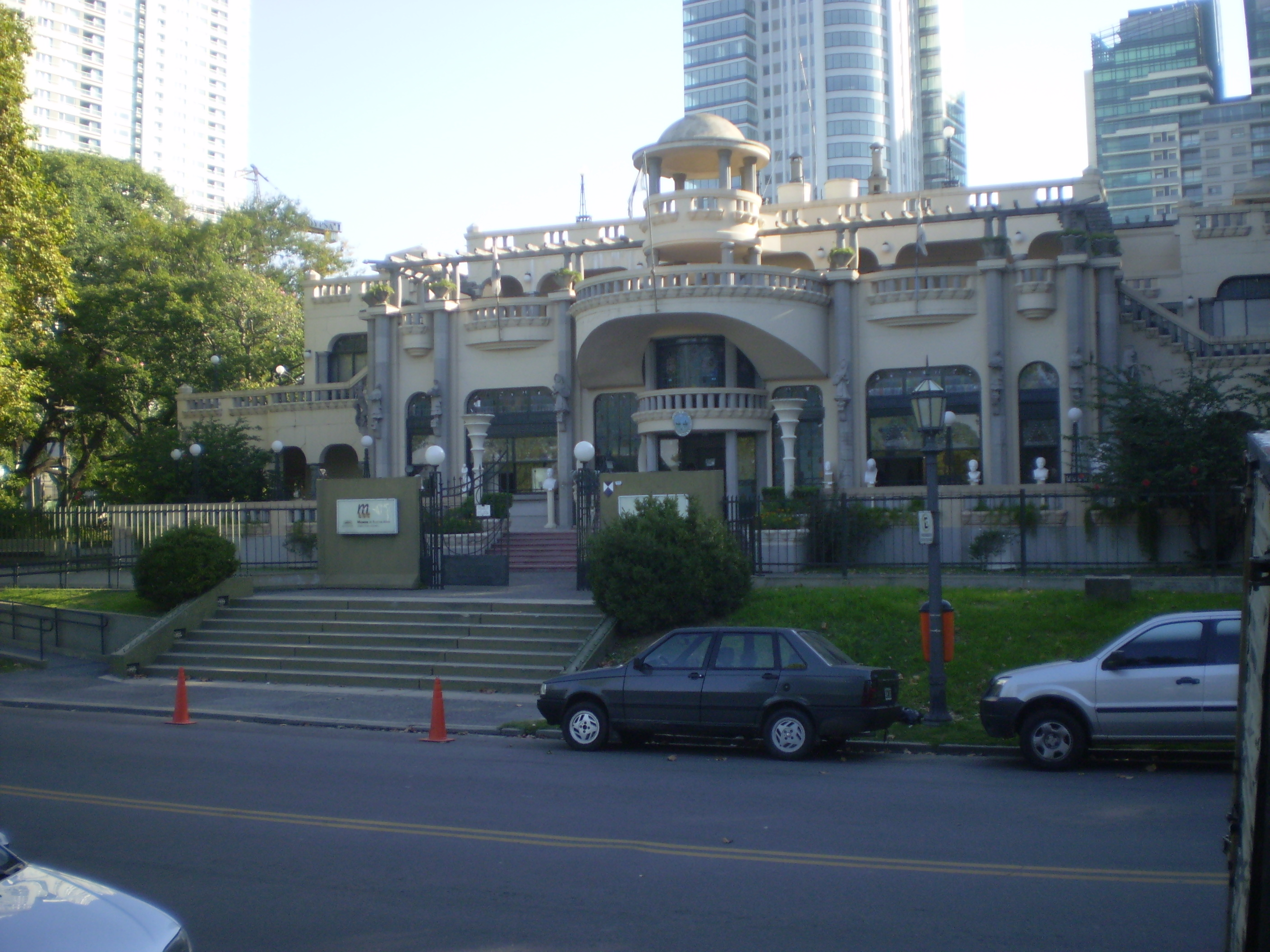 sede del Centro de Museos de Museos de Buenos Aires. Ex cervecerías Munich sucursal balneario costanera sur, actual Puerto Madero